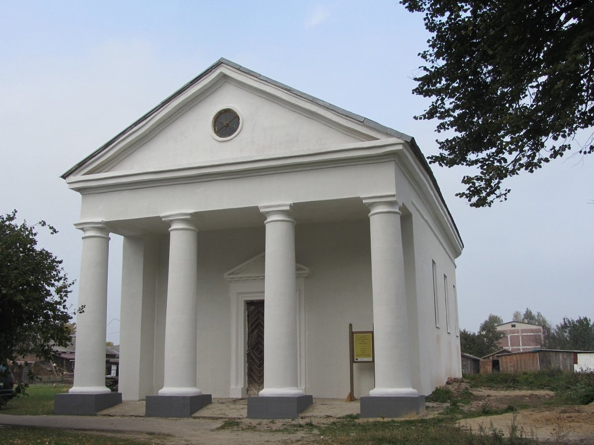 Расна. Збор